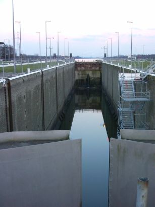 Sluis in herstelling op het Albertkanaal te Hasselt. Eigen foto. Paul Hermans 23 mrt 2004 19:25 (CET)